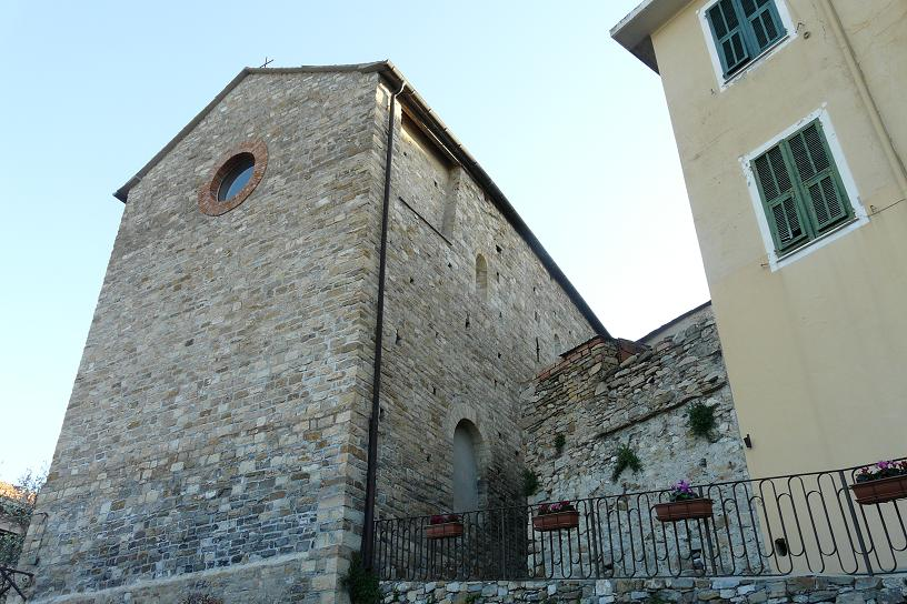 Chiesa di Santa Maria Assunta, Diano Castello, Liguria, Italia